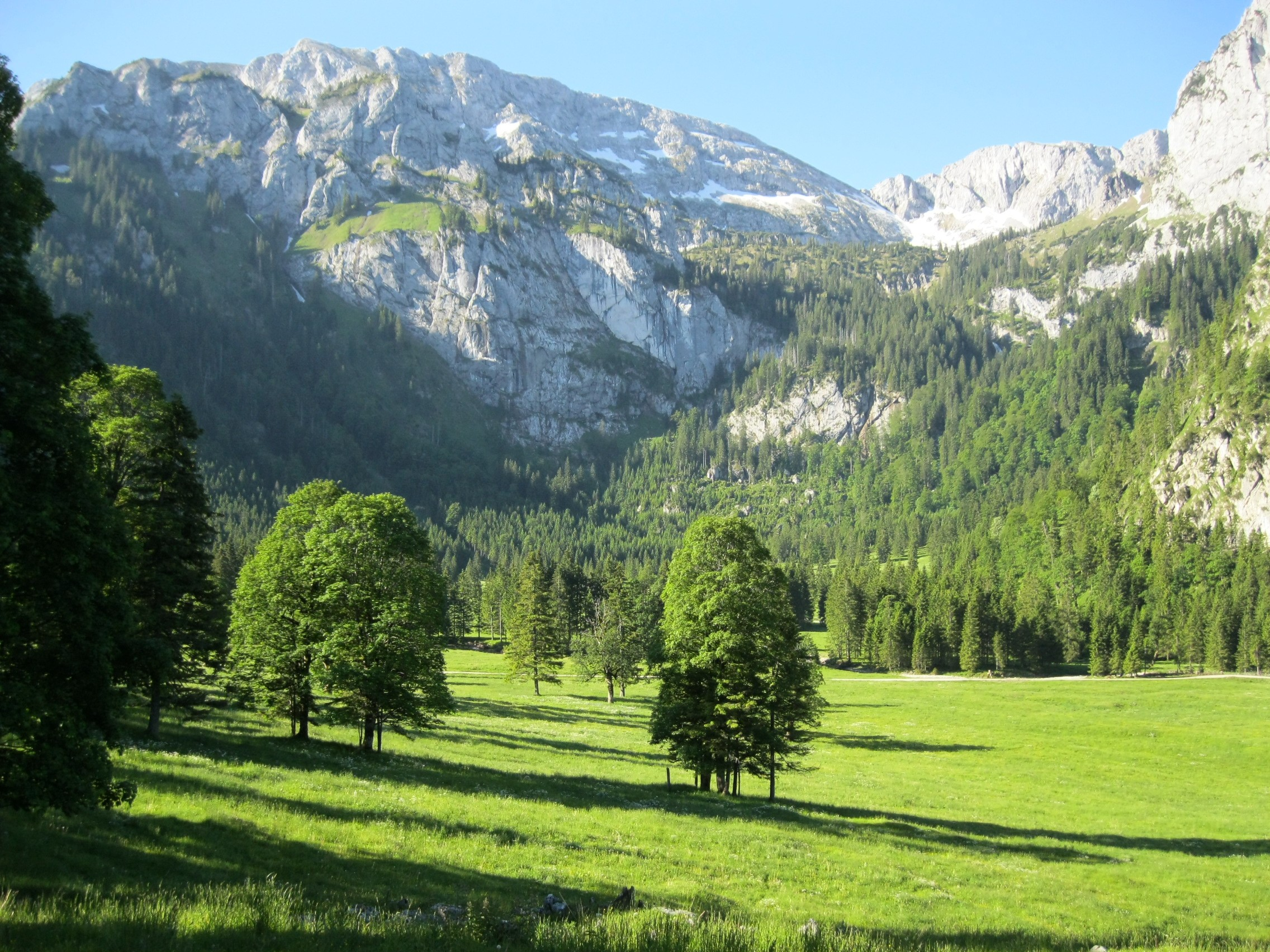 Am Wankerfleck in den Ammergauer Alpen, im Hintergrund die Hochplatte